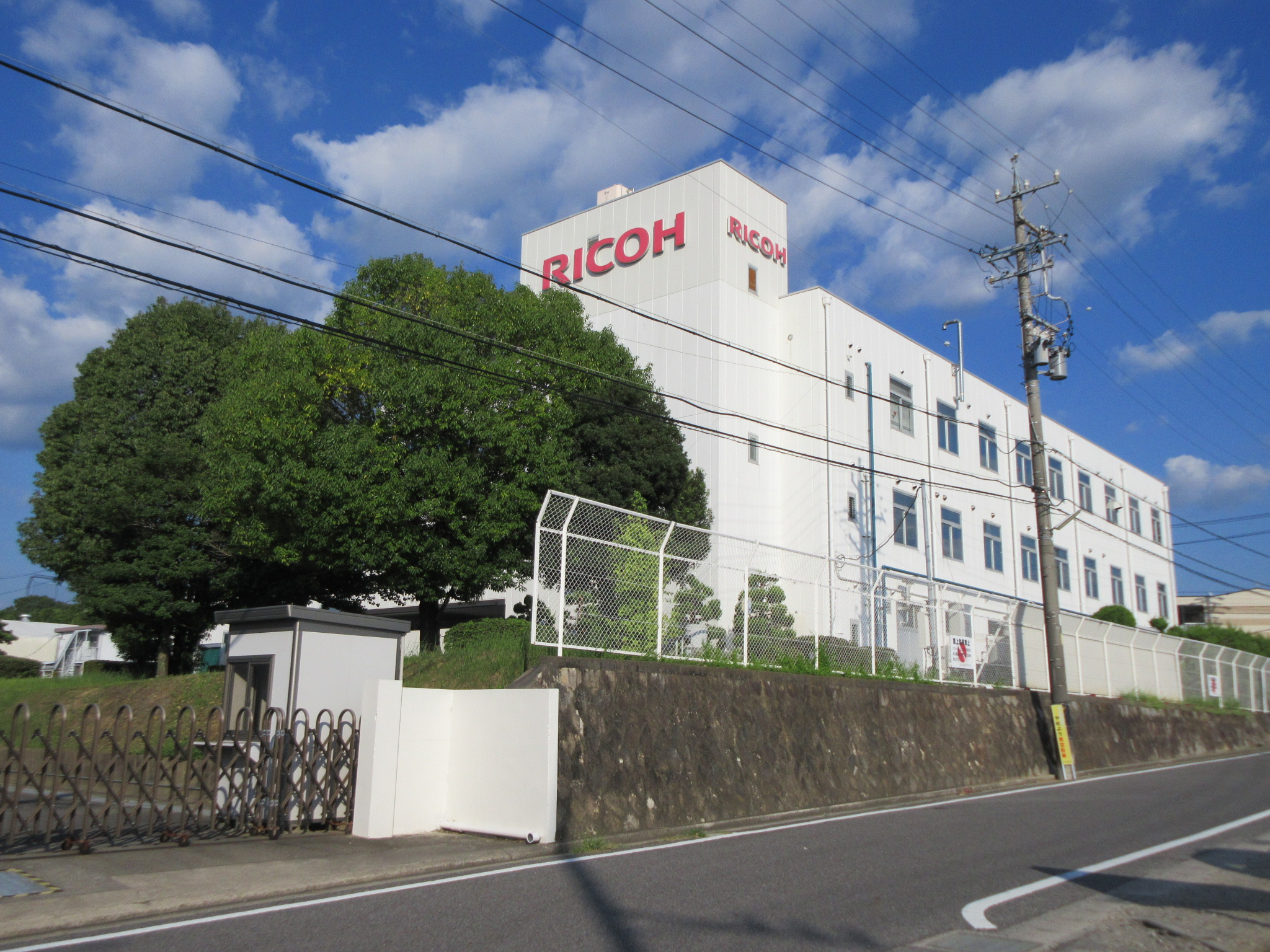 リコーエレメックス株式会社（岡崎市井田町）